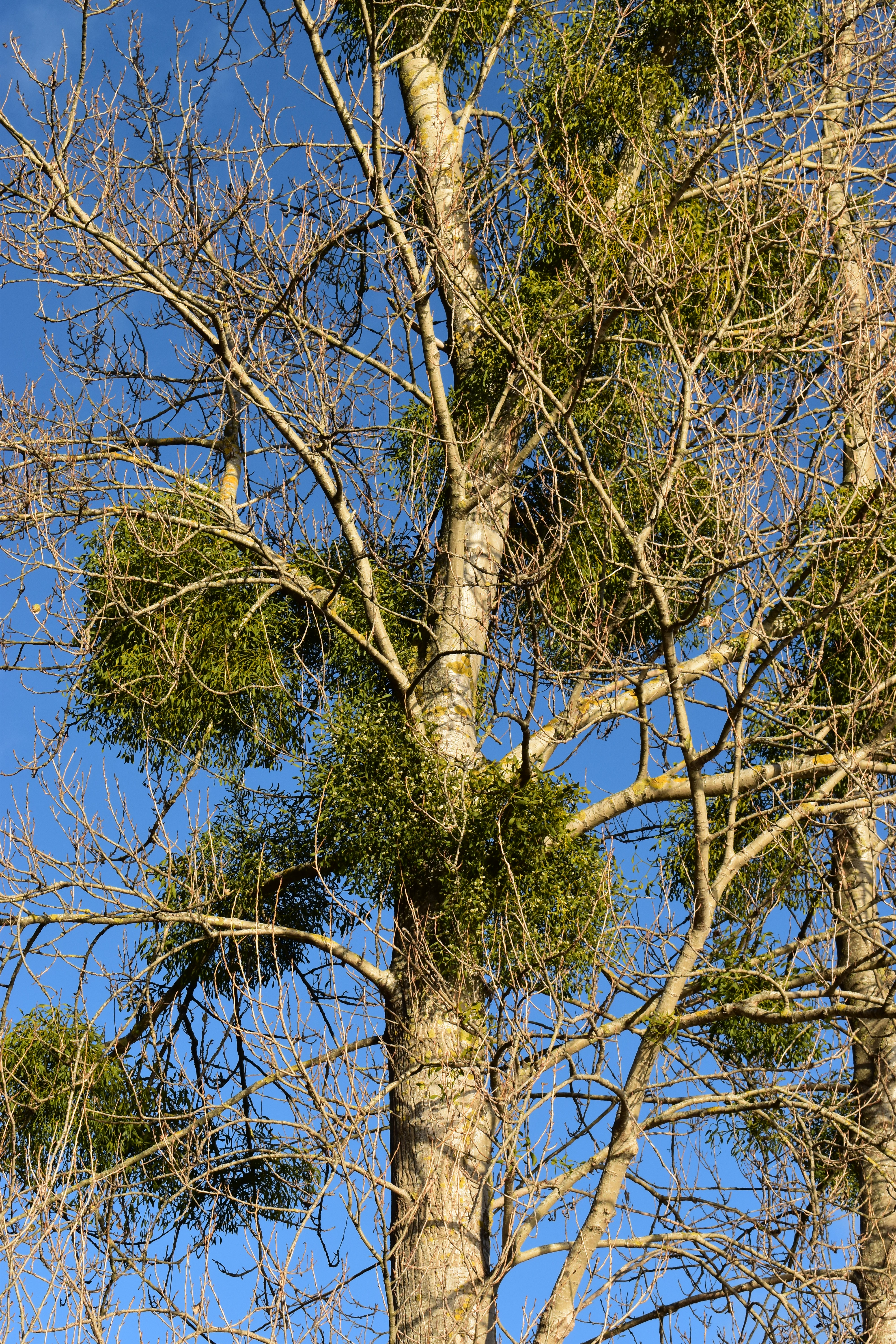 Misteltein fra Tote i Hurum